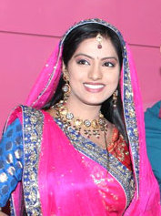 Deepika Singh W:Aamir Khan]|Aamir Khan and Anas Rashid